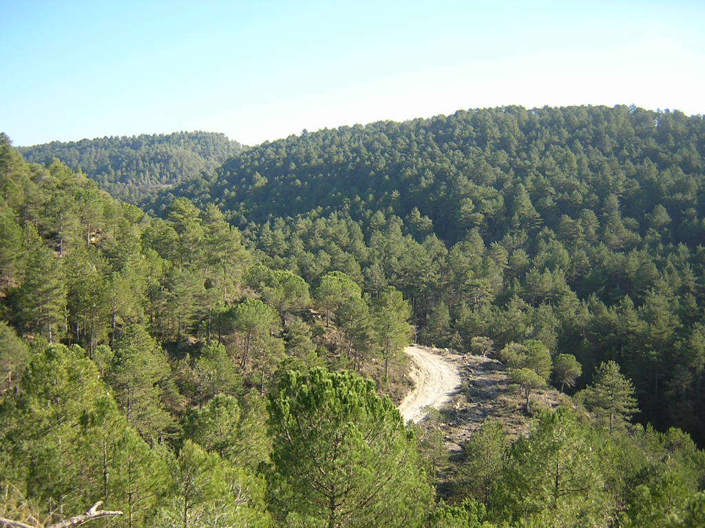 La Carena de la Baga de Vall-llosera (Monistrol de Calders, Moianès)